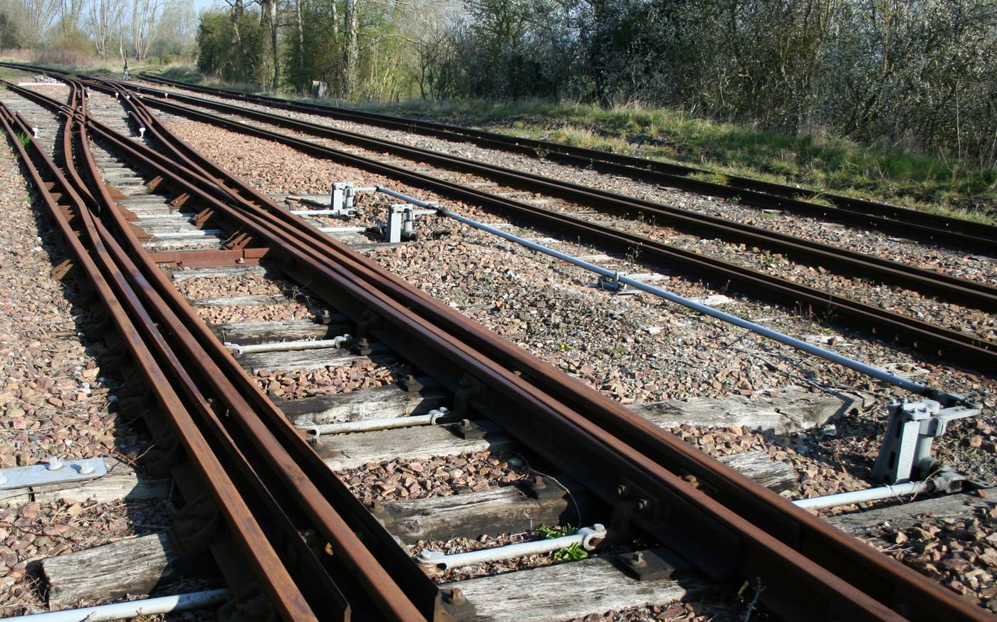 Aiguillage double voie sur le CFBS